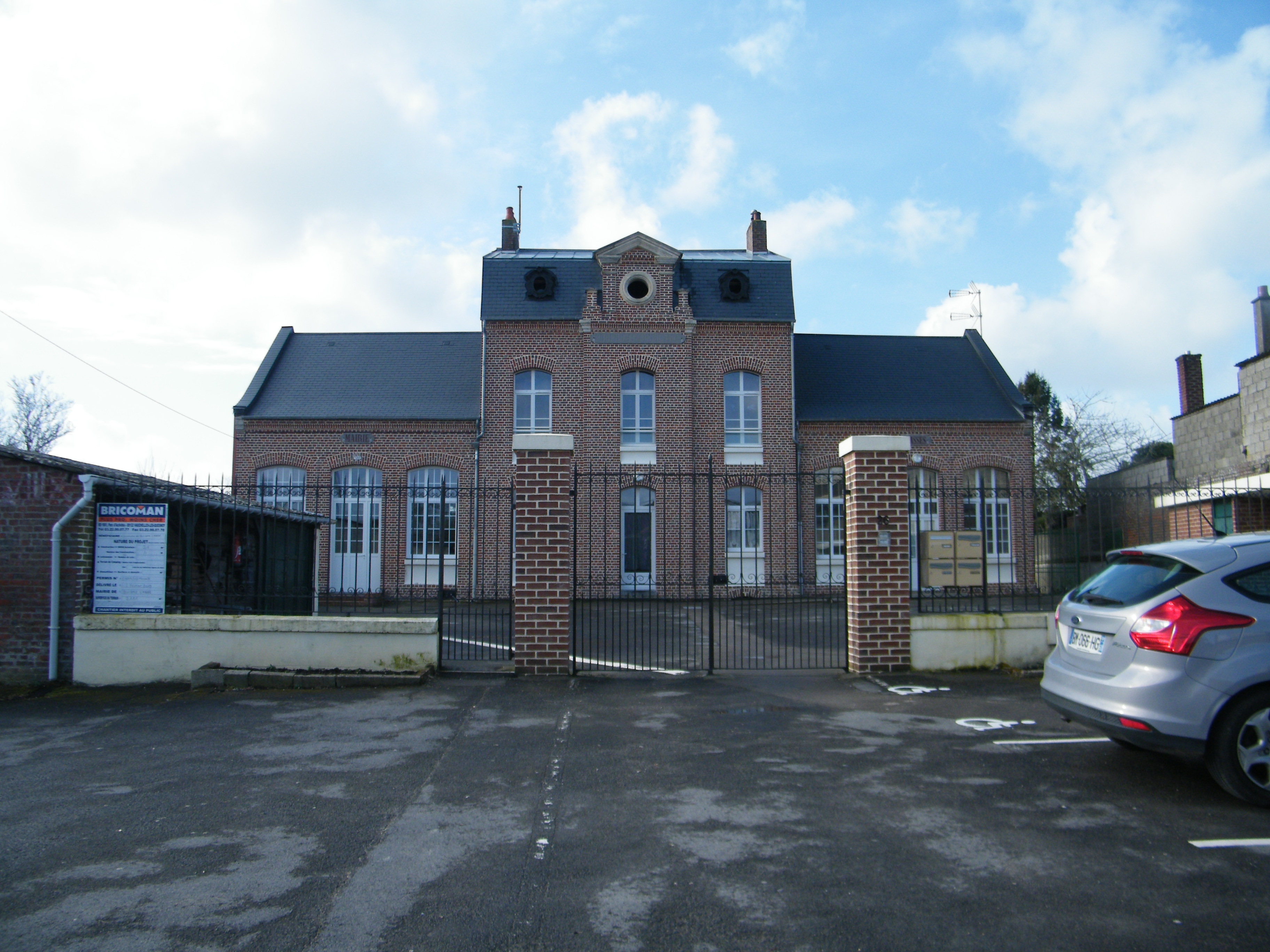 La mairie de Buigny-l'Abbé, ancienne école.